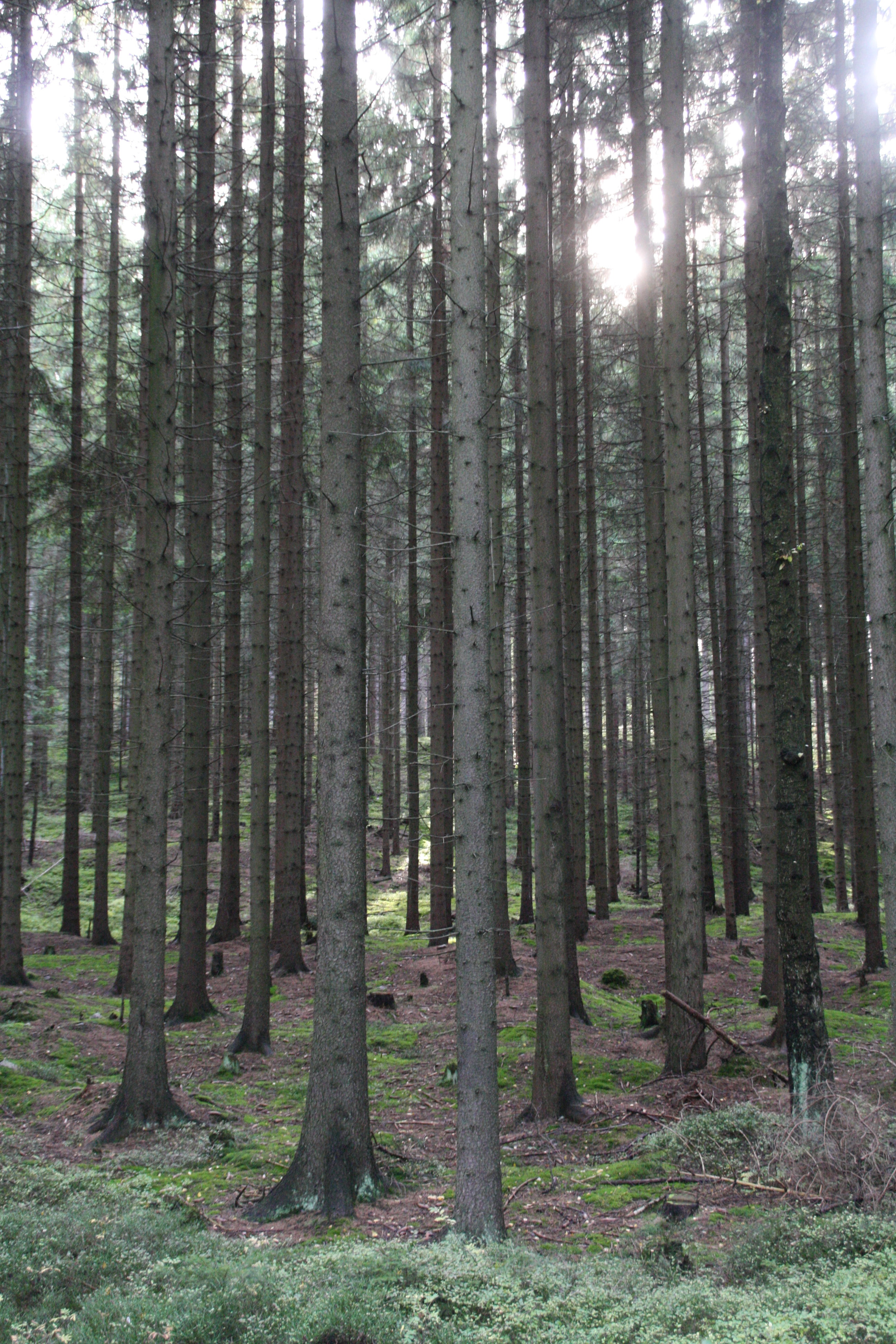 Vysázené monokultury smrků po vytěžení původního lesa.